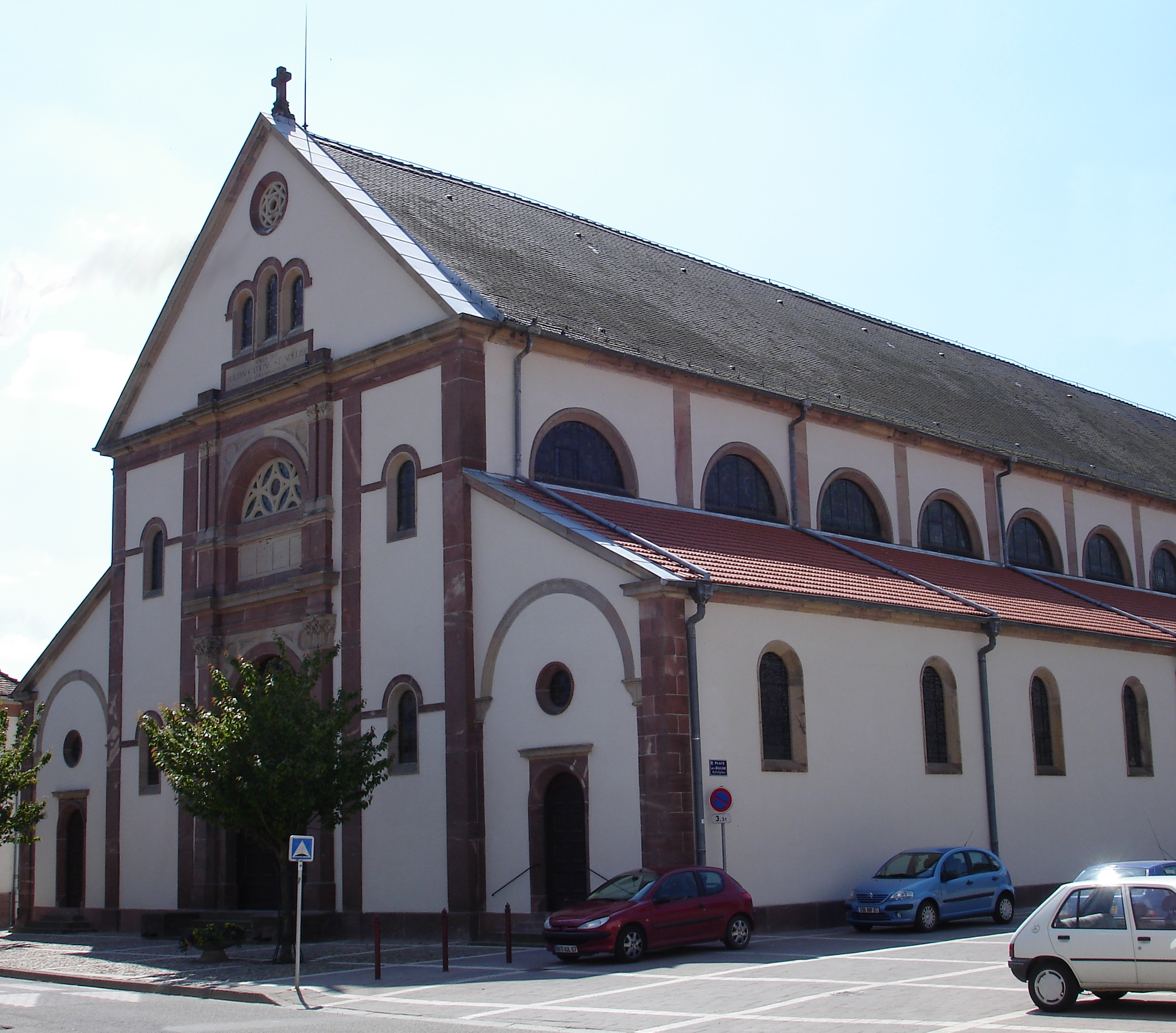 église St-Adelphe de Huttenheim (67230 France)